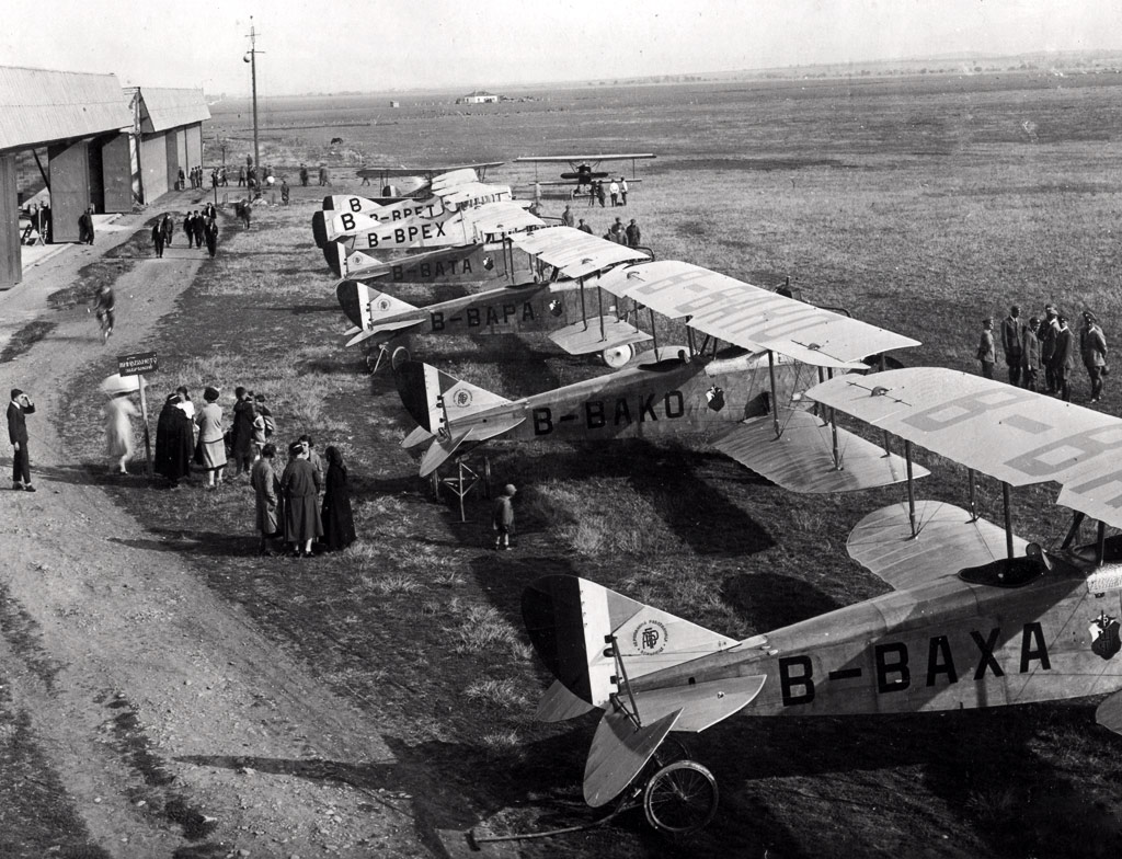 Bürger besuchen die DAR (Staatliche Flugzeug Fabrik) am Flughafen Bozhurishte bei der Vorstellung der ersten in Serie gefertigte Flugzeuge in Bulgarien - DAR "Uzunov 1" (eine Kopie des deutschen DFW CV), wahrscheinlich im Jahre 1926